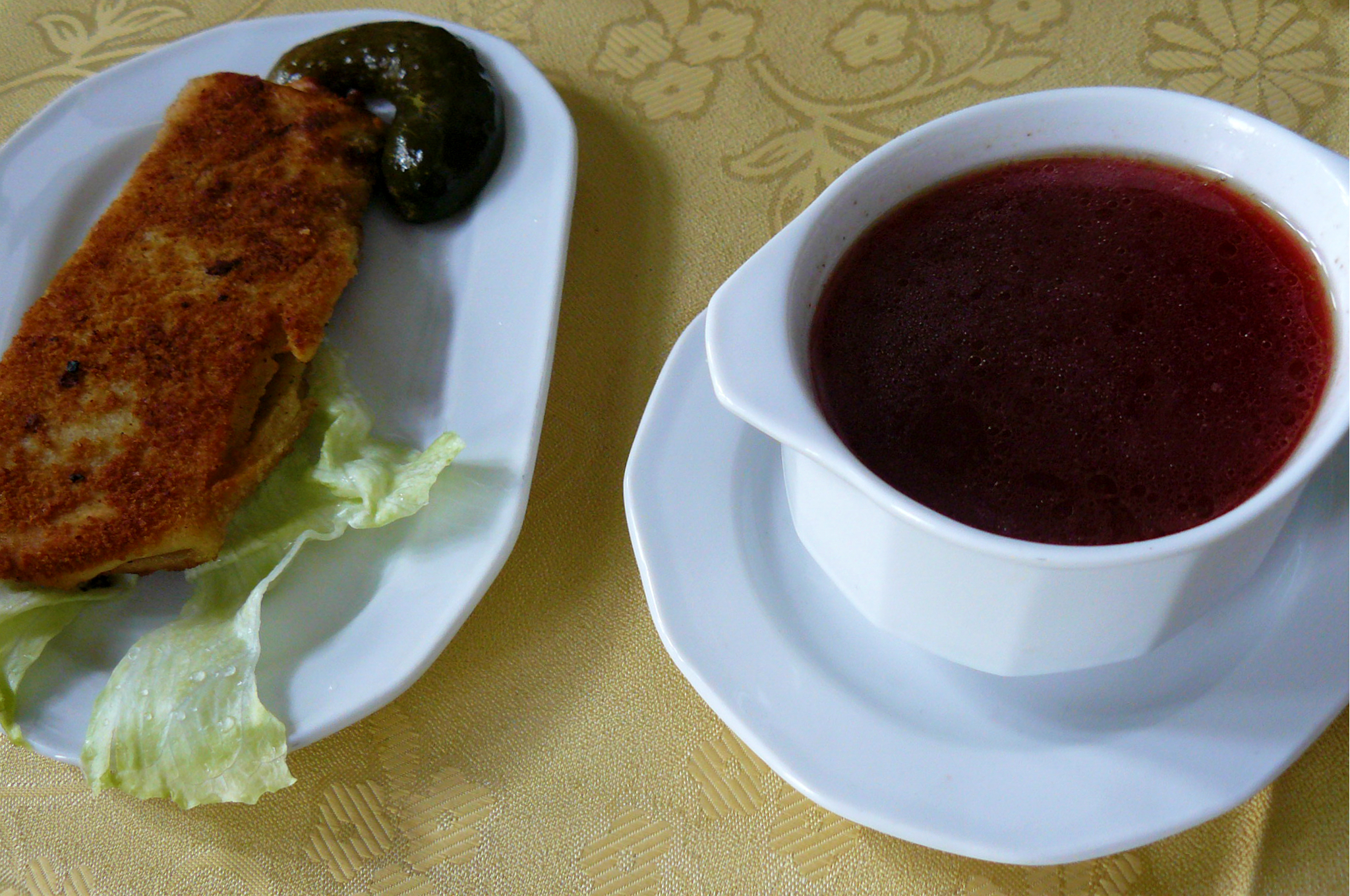 Barszcz czerwony, restauracja w Borgowie.